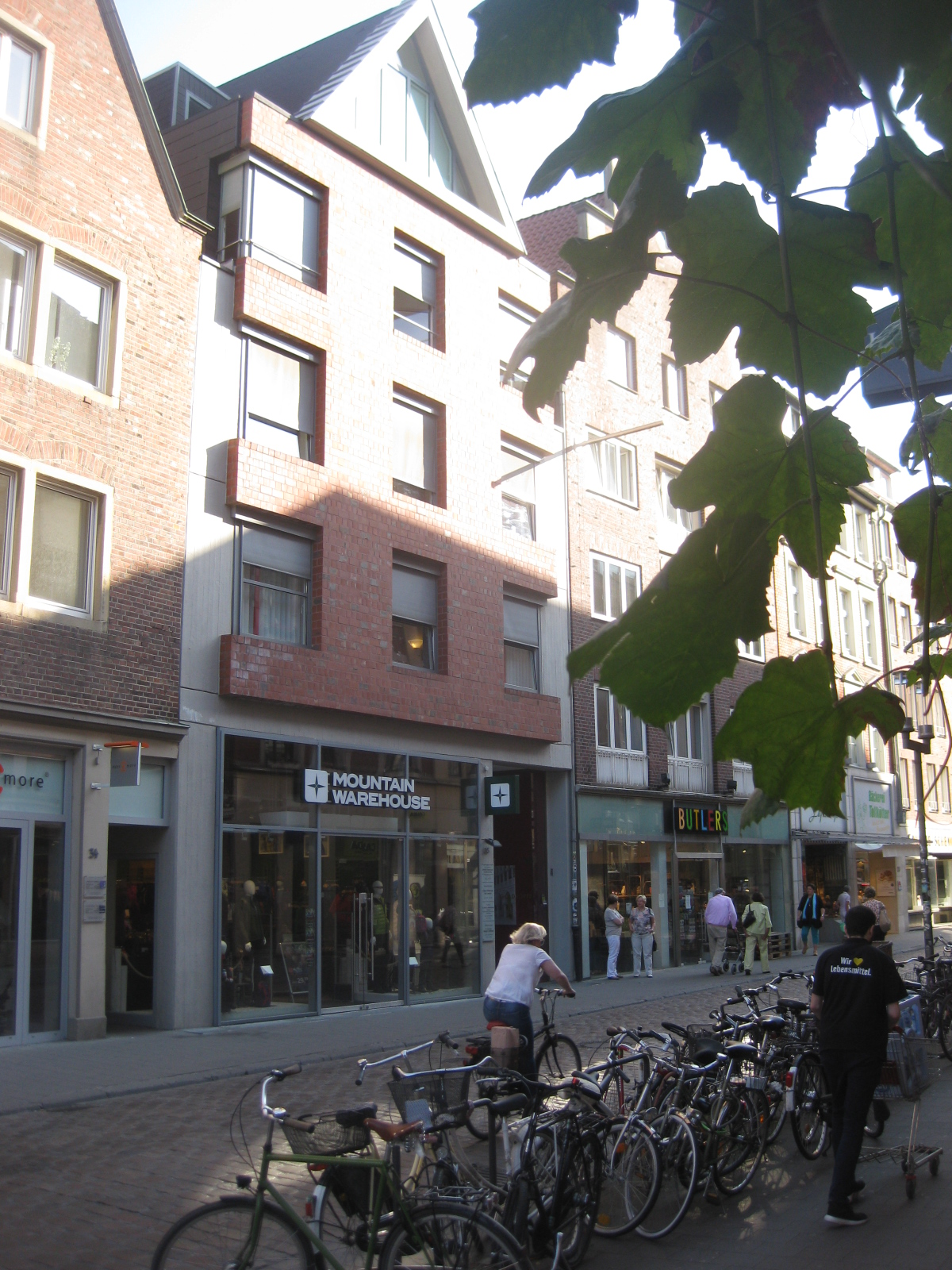 Wohn- und Geschäftshaus in der Altstadt von Münster nach Umbau des Ladenfront (Architekt Max von Hausen), Foto 2016